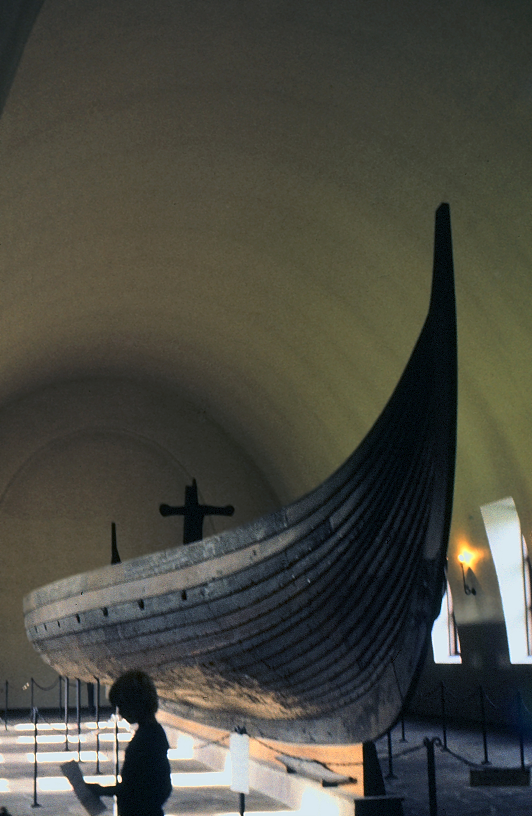 Das Gokstad-Schiff im Vikingskipshuset auf der Halbinsel Bygdøy, Oslo